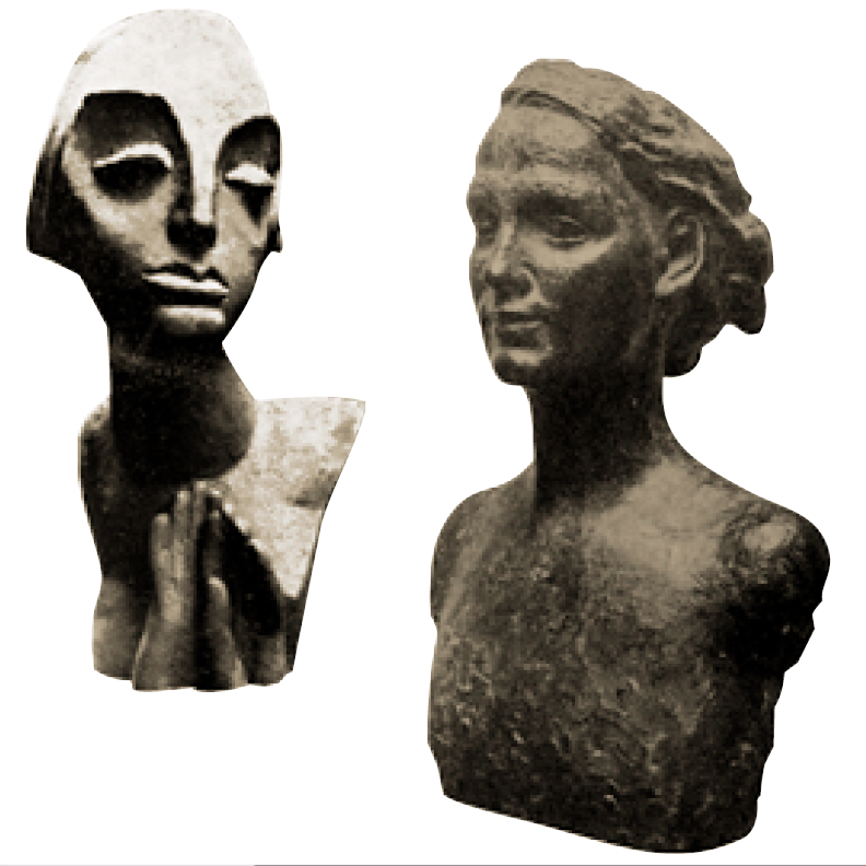 Links im Bild Carl Moritz Schreiner: "Büste Margarethe Aldinger", 1922 (In: Das junge Rheinland, 1. Januar 1922). Rechts im Bild Carl Moritz Schreiner: "Frauenkopf" (In: Katalog der Winterausstellung Bergischer Künstler 1942).